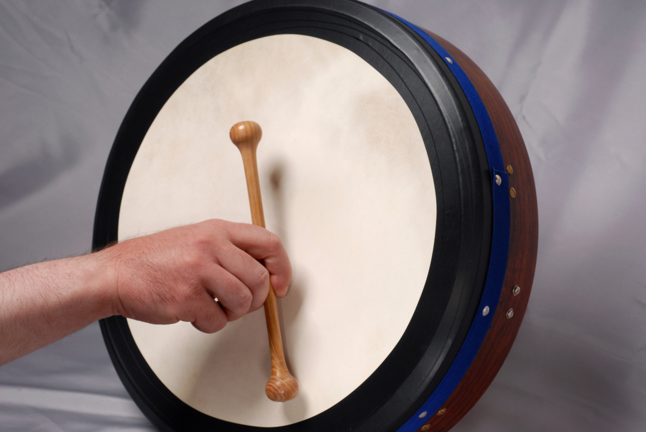 Bodhran